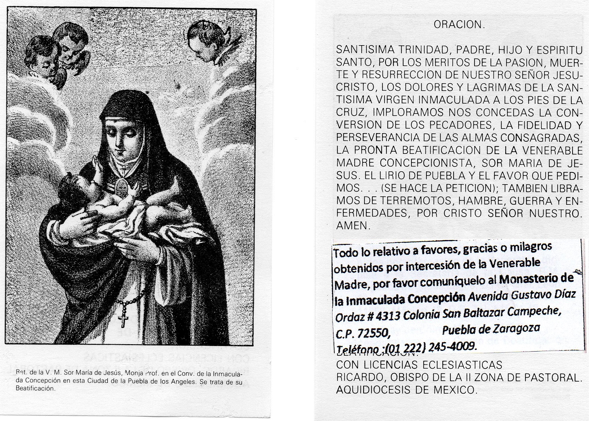 Lirio De Puebla, OIC - Federación Santa Mª de Gpe - Monasterio de la Inmaculada Concepción de la Puebla de los Ángeles